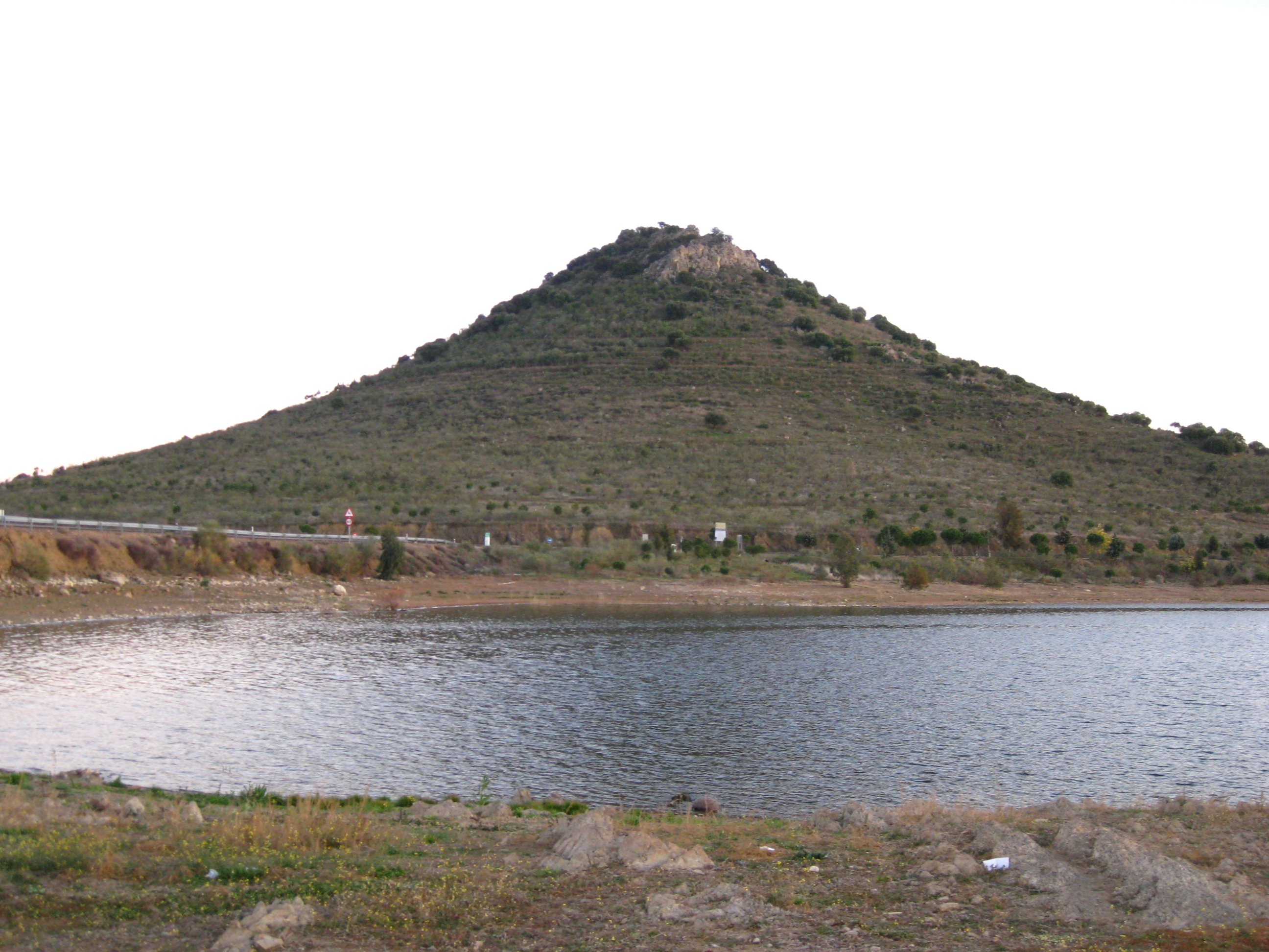 Cerro Masatrigo. Marzo de 2012